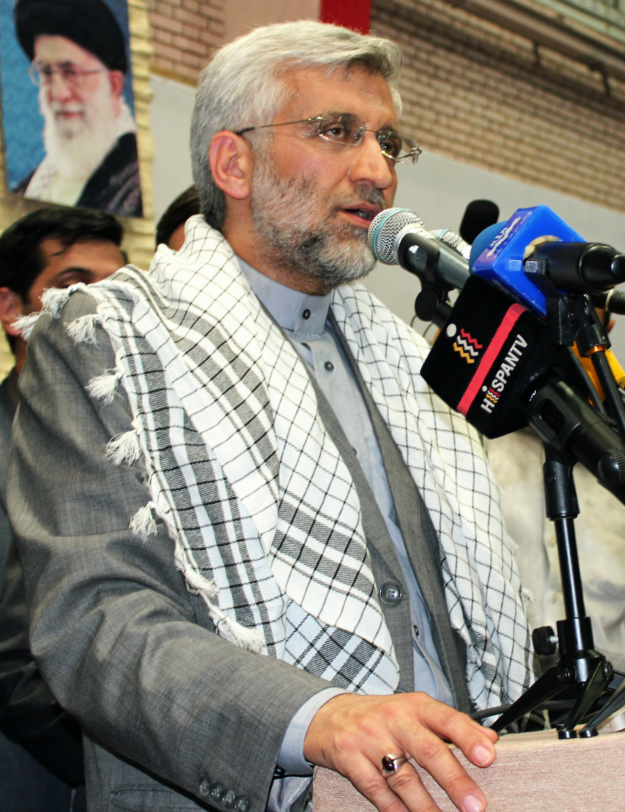 دکتر سعید جلیلی در سفر انتخاباتی مشهد تاریخ ۲۰ خرداد ۱۳۹۲